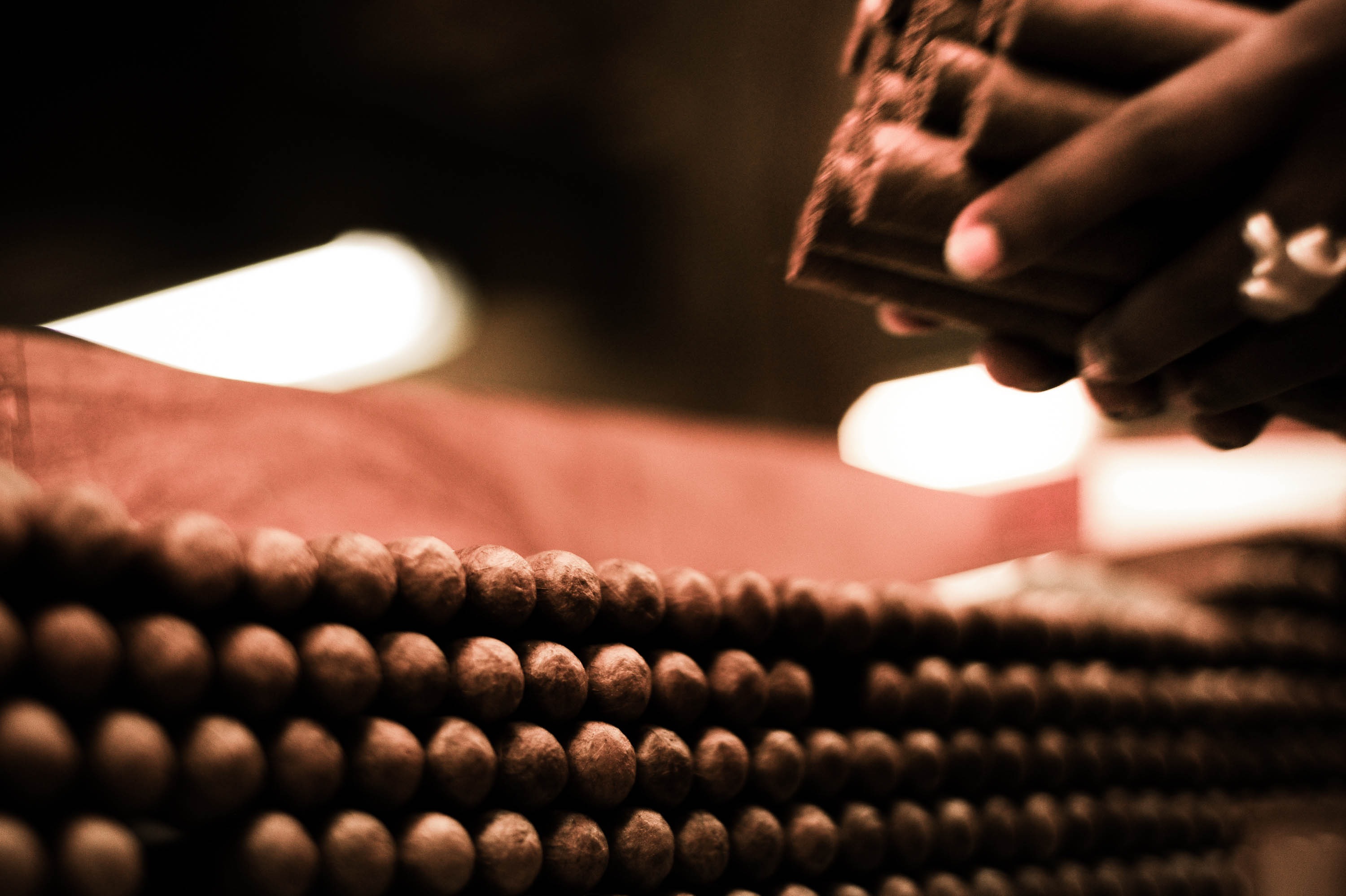 Keywords:Caribbean; Casa Del Campo; Cigar factory; Dominican Republic; La Romana; Домениканская республика; Карибские острова; Ла Романа; Фабрика Сигар Handmade cigars. Tabacalera de Garcia Factory. Casa de Campo, La Romana, Dominican Republic.